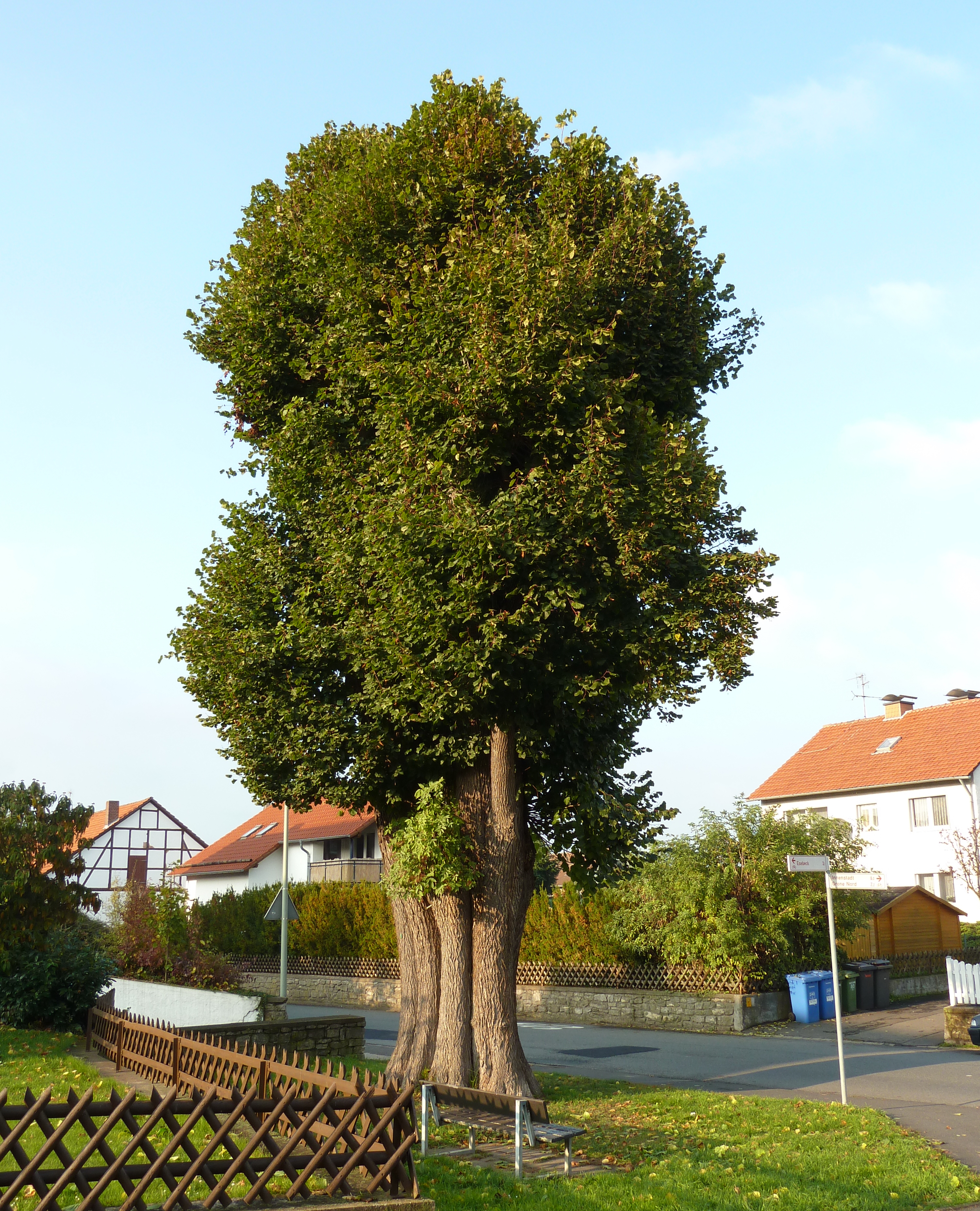 Linde an der Einmündung der Straße Zum Sommerberg in die Straße Gesundbrunnen in Elliehausen, Stadt Göttingen, Südniedersachsen. Im Jahr 2007 wurde wegen Pilzbefall die Baumkrone drastisch zurückgeschnitten. Naturdenkmal GÖ-S 00042